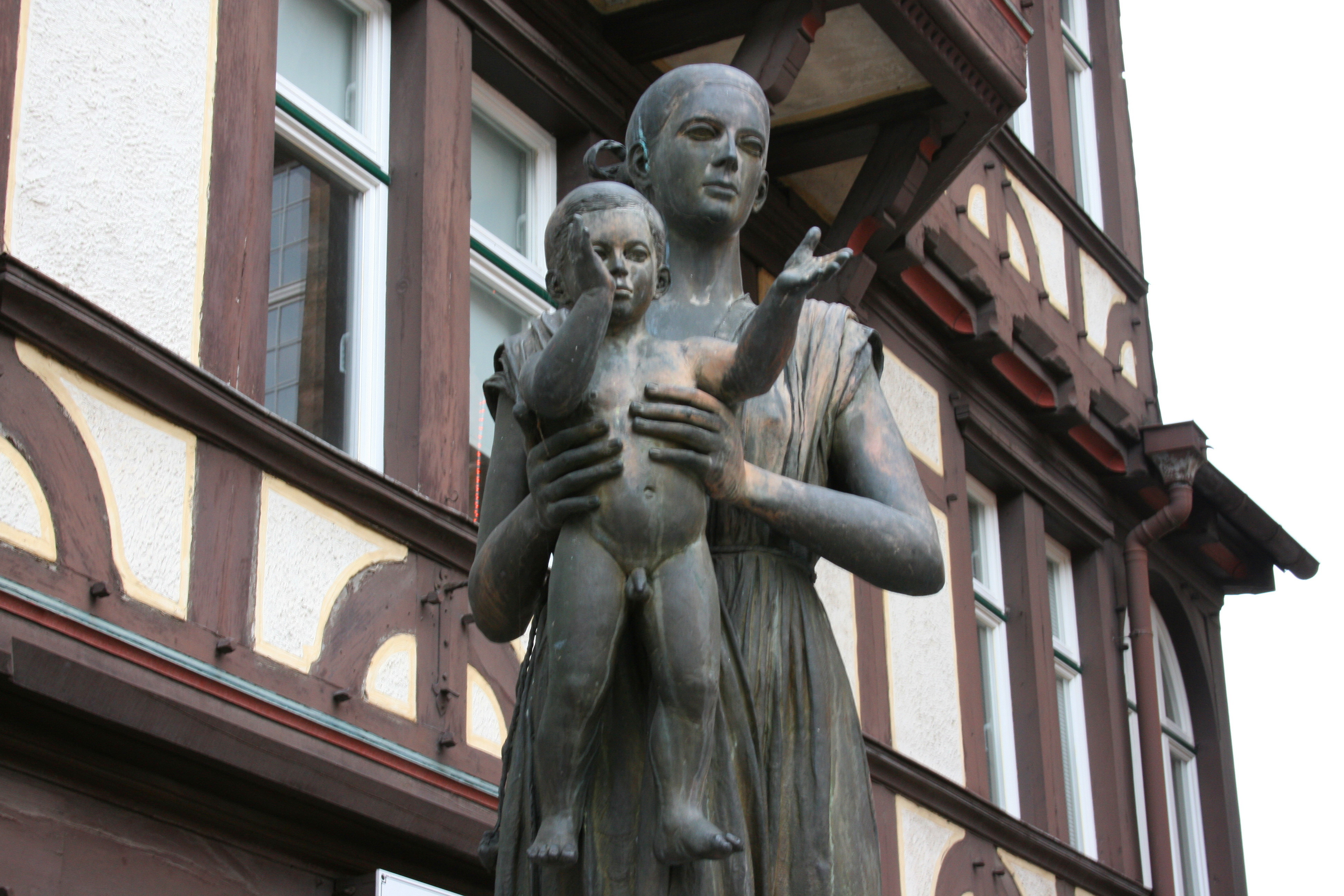 Denkmal für Sophie von Brabant und Landgraf Heinrich I. von Hessen in Marburg. Dargestellt wird die Szene als Sophie ihrem minderjährigen Sohn Heinrich I. anlässlich dessen Erhebung zum Landgrafen von Hessen huldigen lässt.